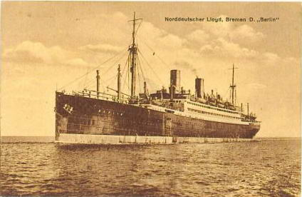 Steamship "Berlin"